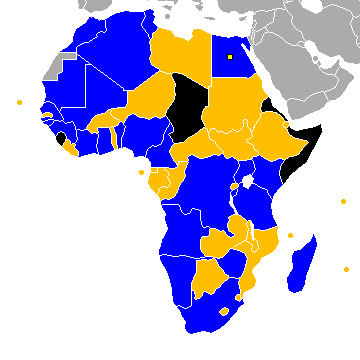 Mapa representativo da classificação dos países na Copa Africana de Nações de 2019.